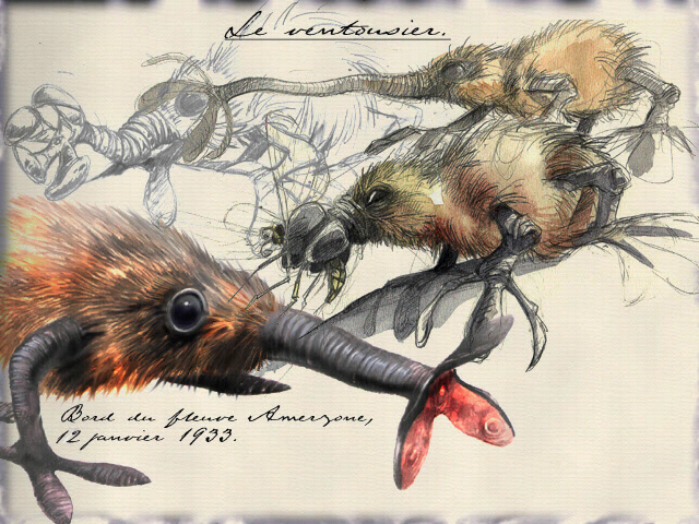 Capture d'écran du jeu vidéo L'Amerzone (1999), développé et édité par Microïds.